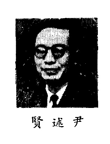 中文（中国大陆）: 制憲國民大會代表